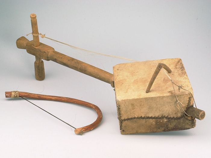 Deze gestreken langhalsluit (vedel) heeft 1 snaar van plantaardig vezel, die van de stempen via een kam naar het uiteinde van de klankkast loopt. Het is een zg. 'spiesluit', omdat de hals door het klanklichaam heengaat en er aan de andere kant weer uitkomt.